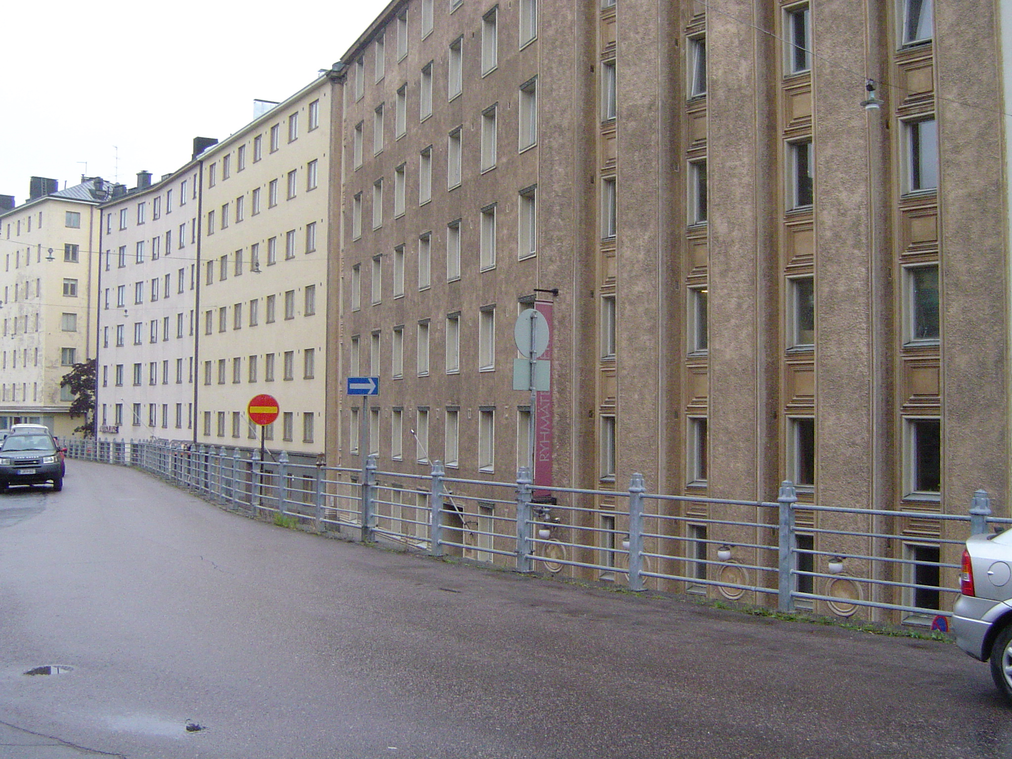 Pengerkatu, Kallio